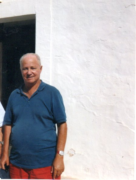 En Ibiza, España. 2014.